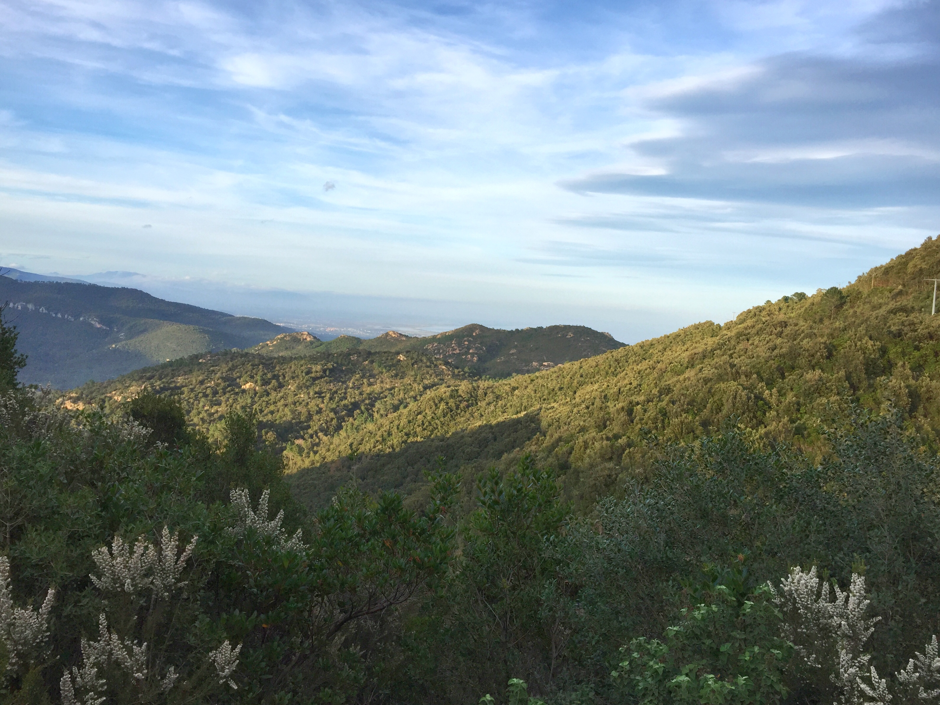 Formation maquis prés de Solenzara